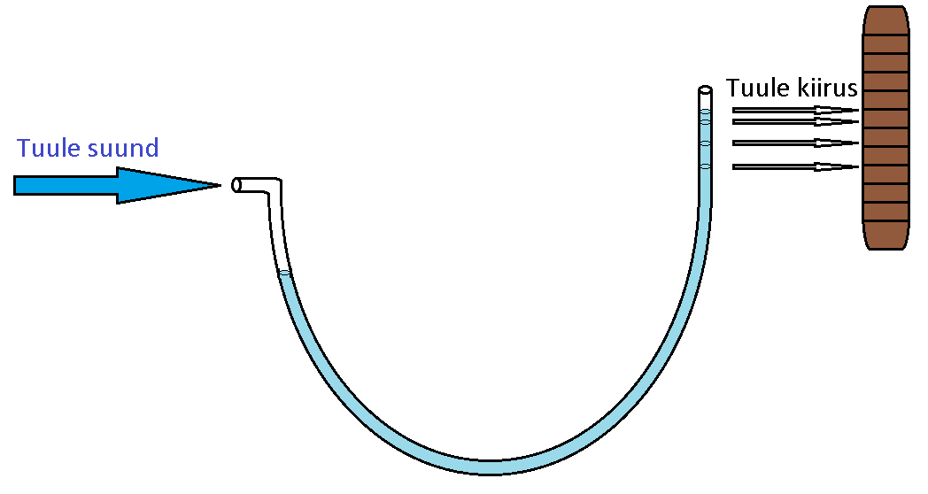 James Lind'i toruanemomeetri skeem